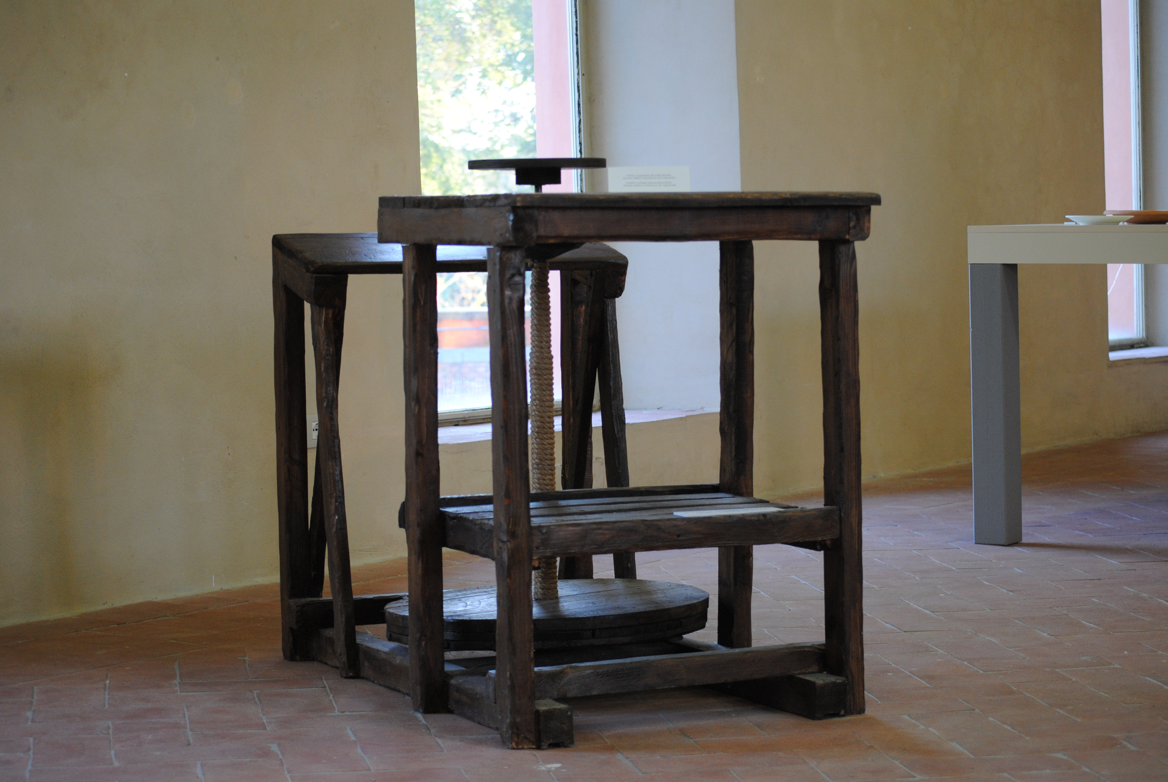 Torno veloce da vasaio mosso dal piede. Il vasaio lavorava seduto sulla panca inclinata e con il piede metteva in moto il volano che, collegato tramite un'asta al piatto, permetteva all'artigiano di modellare il panetto di argilla secondo la forma voluta. Il banco in legno di fronte la panca serviva principalmente come base di appoggio per gli attrezzi del mestiere, per i pigmenti usati dai vasai per decorari i pezzi e per tenere una bacinella contenente acqua che serviva al vasai per inumidire le mani durante la modellazione.